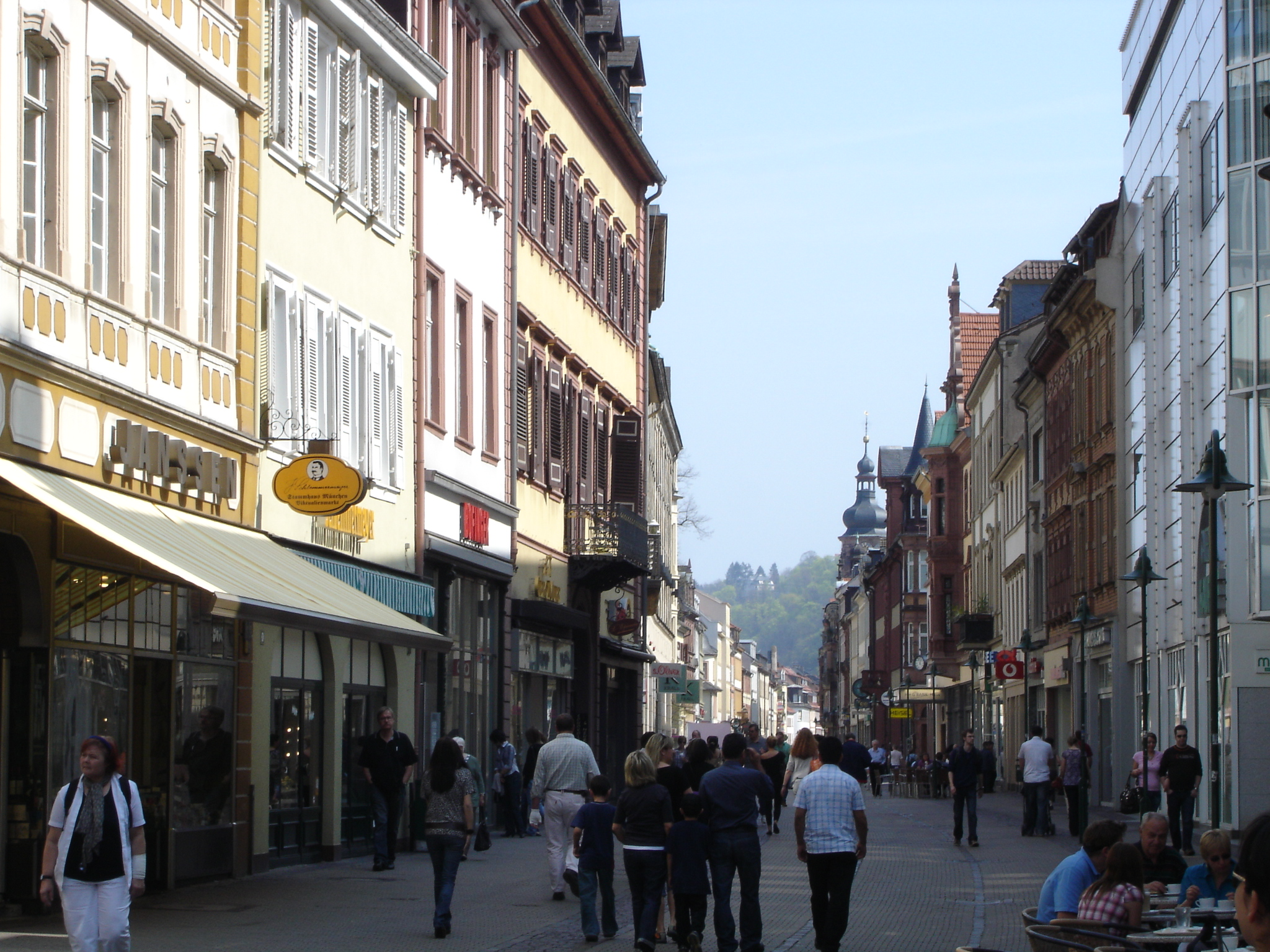 Ciudad de Heidelberg en Baden-Württemberg / City of Heidelberg in Baden-Württemberg Ciudad de Heidelberg en Baden-Württemberg / City of Heidelberg in Baden-Württemberg